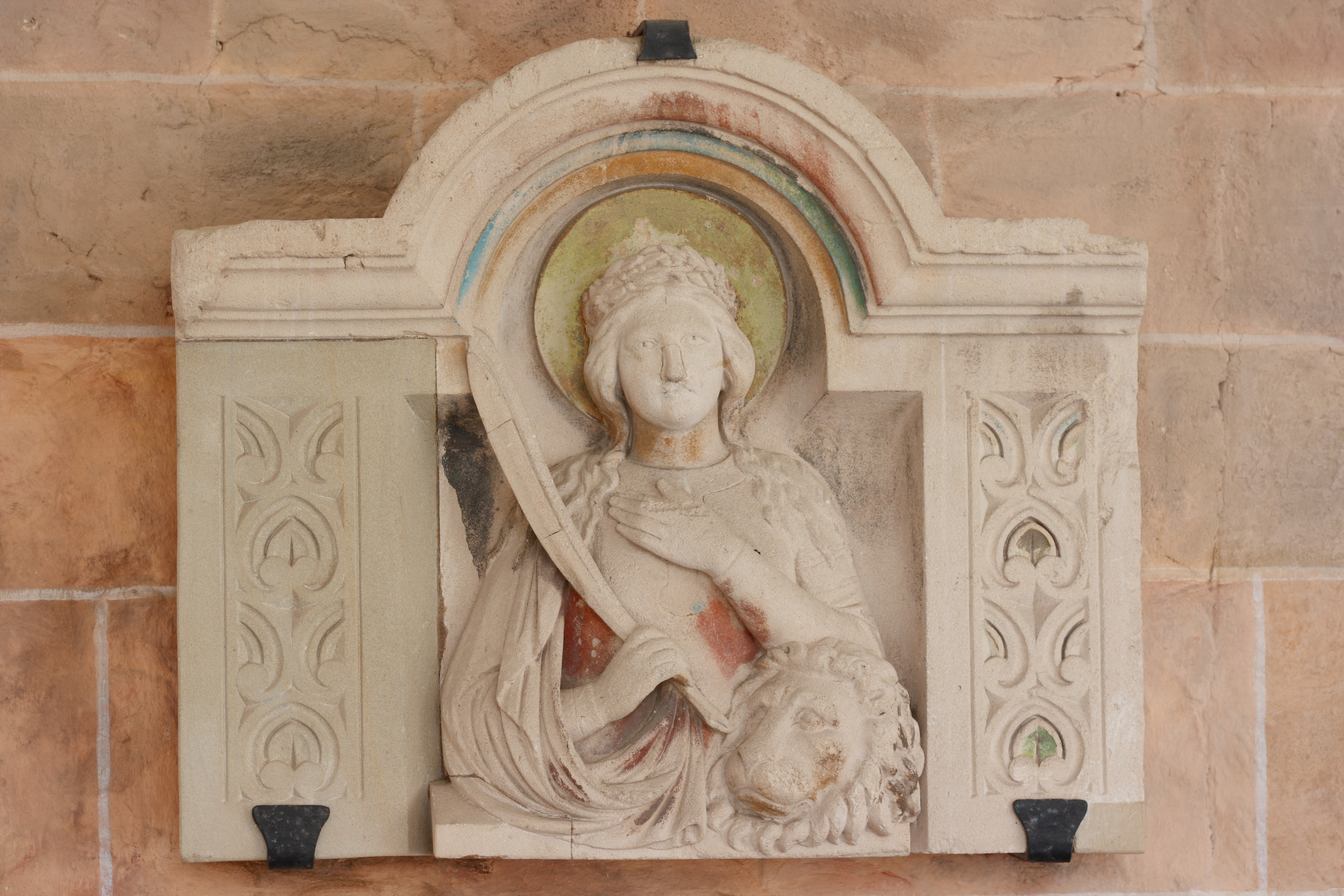 Relief der hl. Daria in der katholischen Pfarrkirche (Stiftskirche) St. Chrysanthus und Daria in Bad Münstereifel